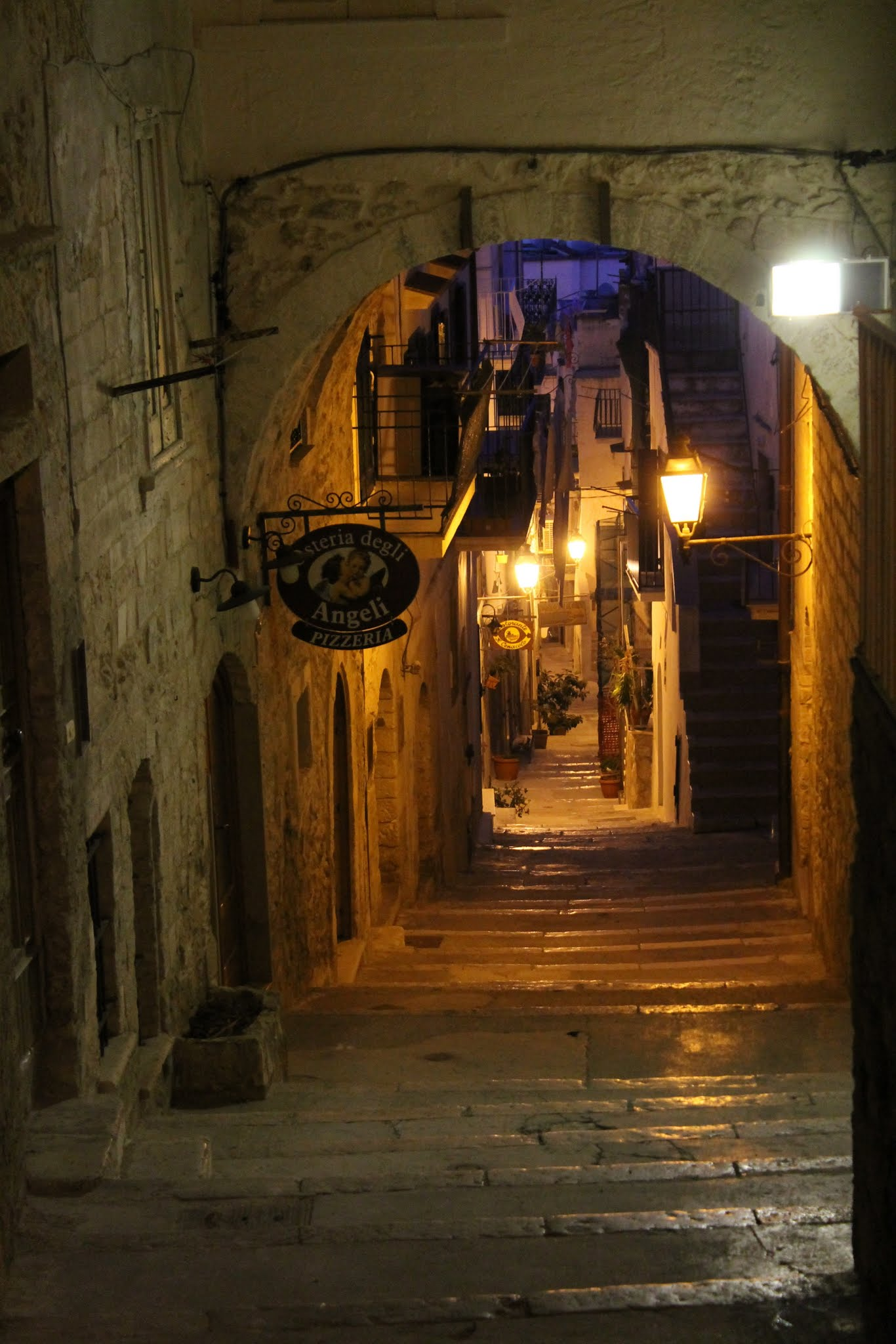 Vieste , Italie